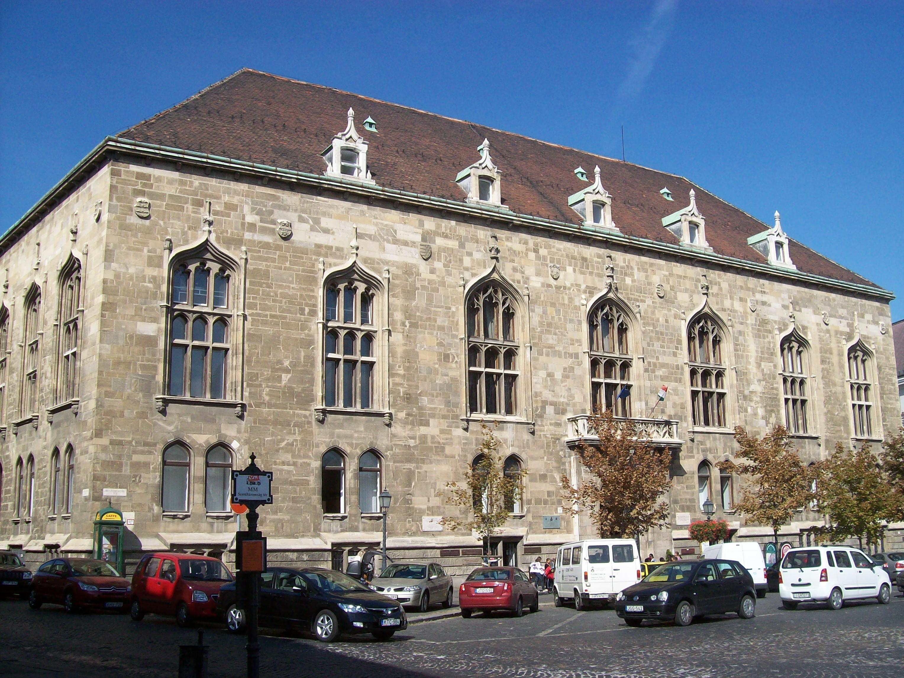 A Magyar Országos Levéltár Szentháromság téri épülete Budapesten